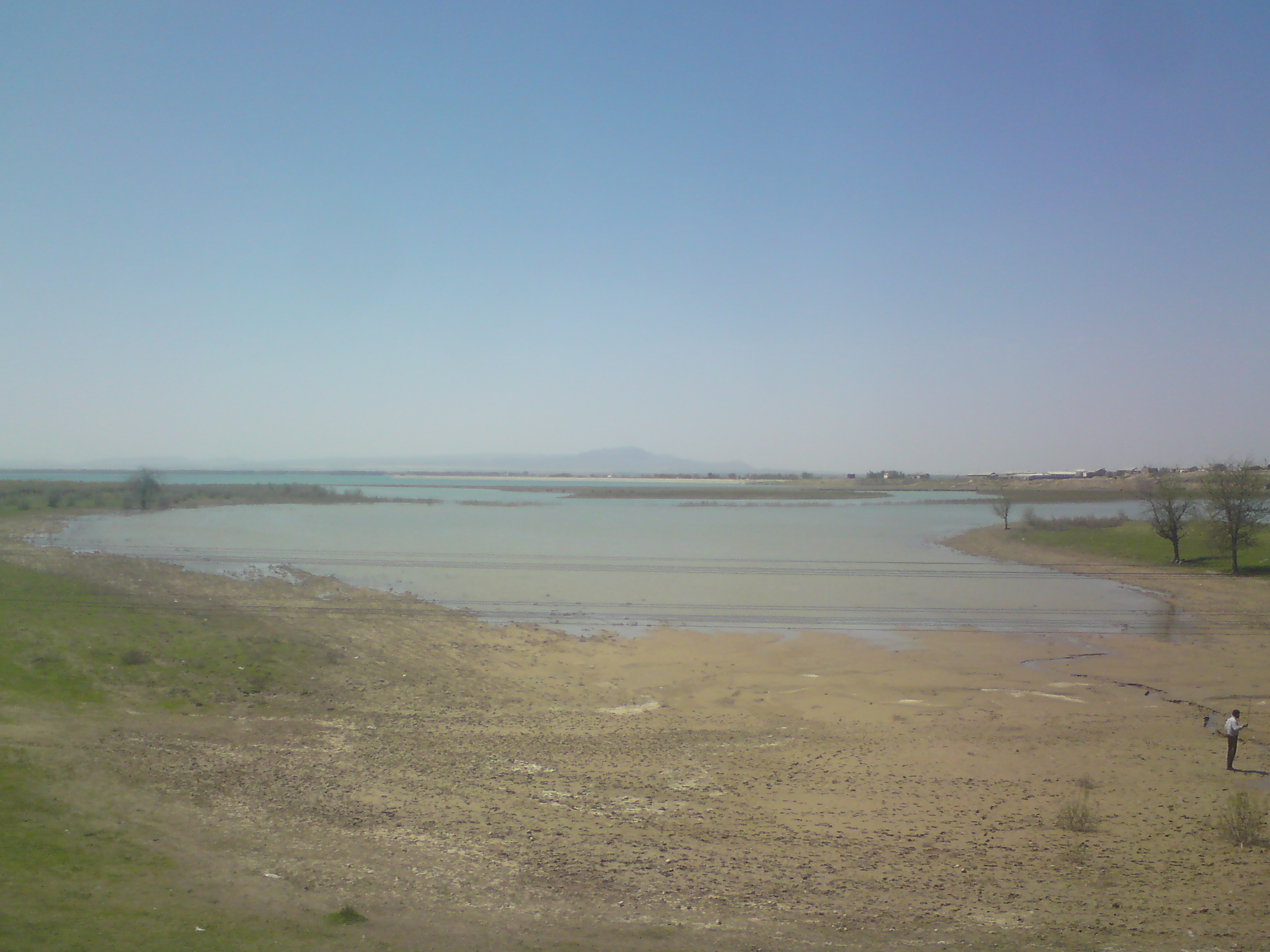 Каттакурганское водохранилище у подхода железной дороги, Самаркандский вилоят, Узбекистан